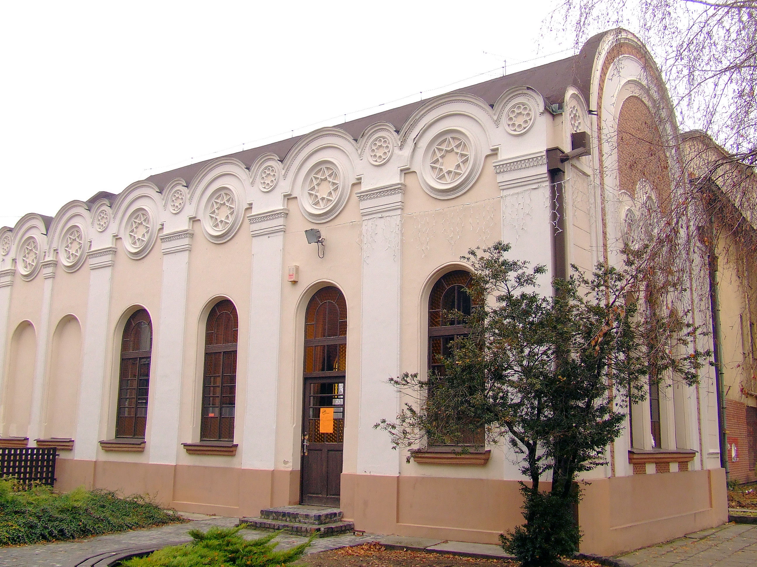 A kiskőrösi zsinagóga. Épült 1915-ben. 1988-ban felújították, jelenleg hangversenyterem This is a photo of a monument in Hungary, Identifier: 2278